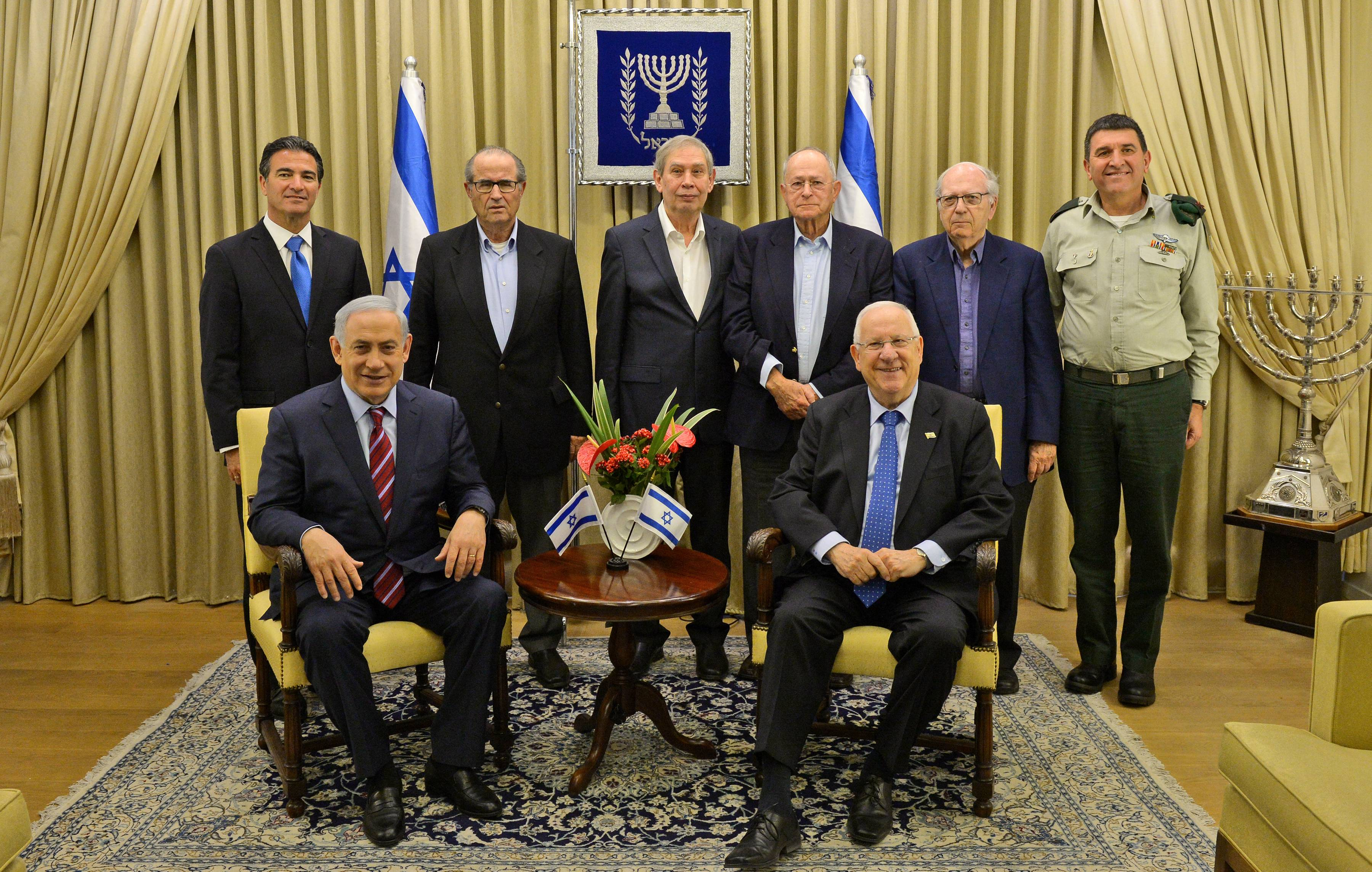 אירוע טקס מתן תעודות הוקרה לעובדי המוסד. יושבים מימין ראובן ריבלין נשיא מדינת ישראל ובנימין נתניהו ראש ממשלת ישראל. עומדים ראשי המוסד, מימין לשמאל: חסון חסון - מזכירו הצבאי של נשיא המדינה, אפרים הלוי, נחום אדמוני, תמיר פרדו, שבתאי שביט ויוסי כהן.